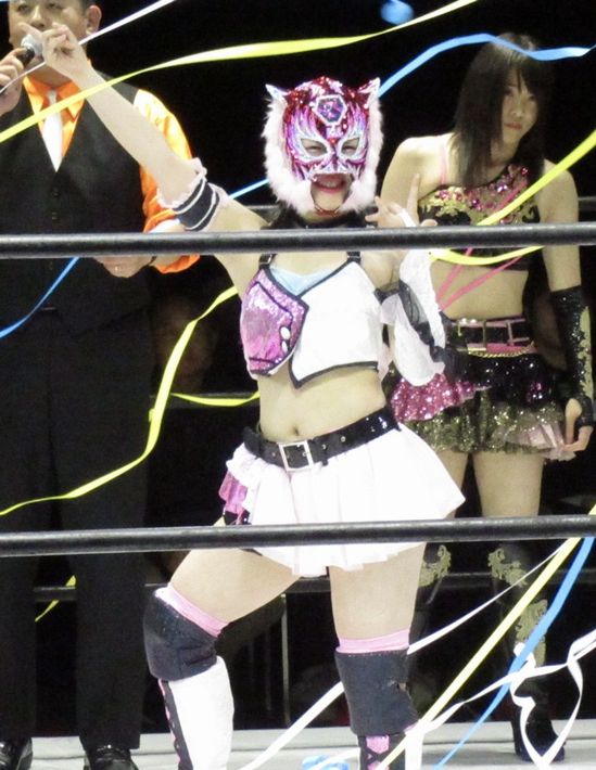 2019年大阪大会にて